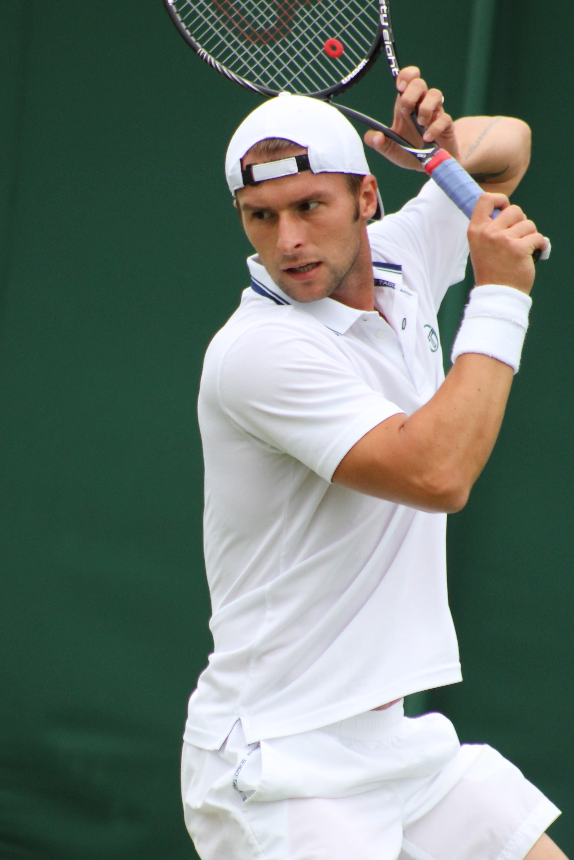 Ungur WM13-003